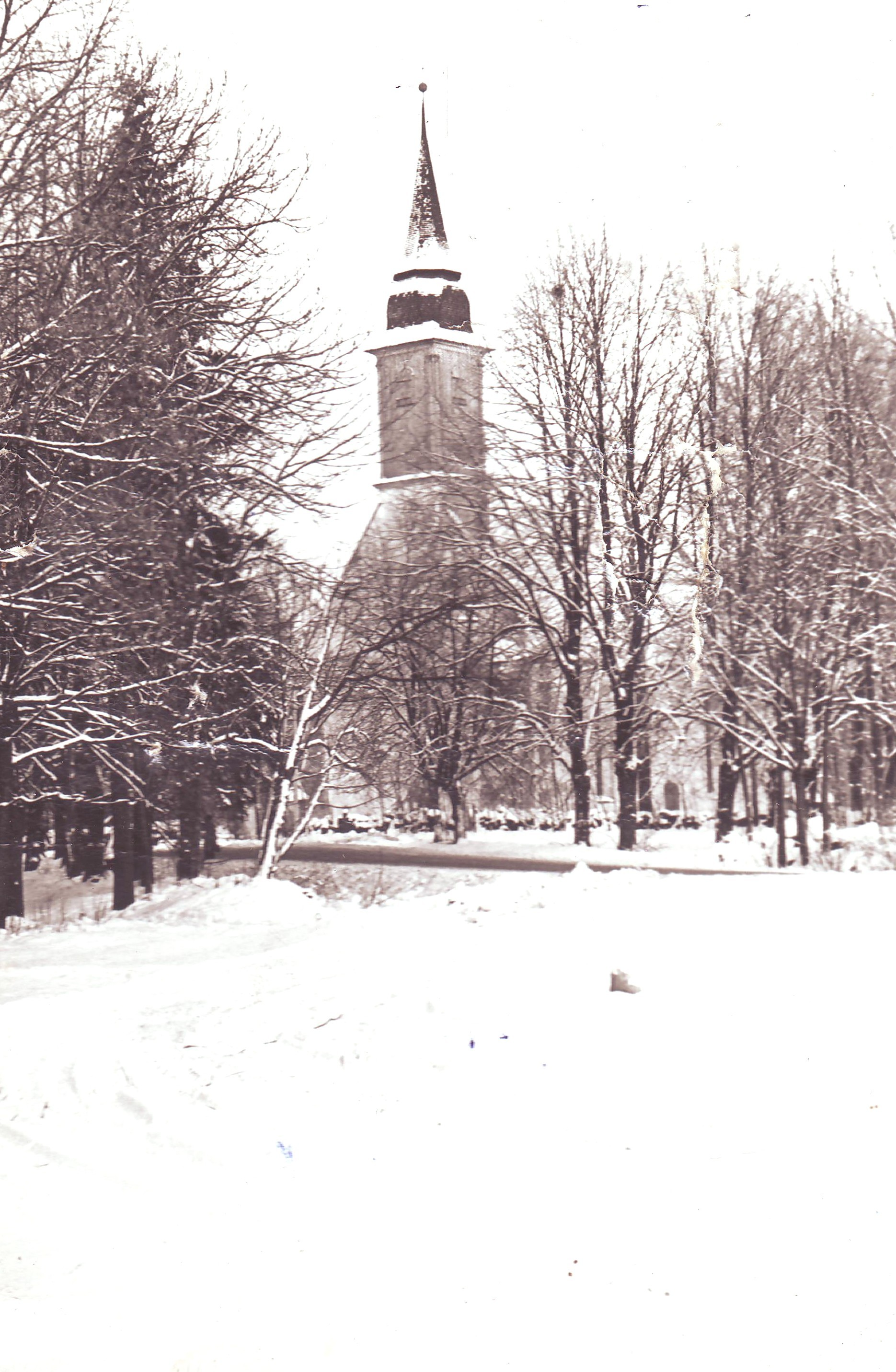 Vaade Puhja kirikule Elva teelt